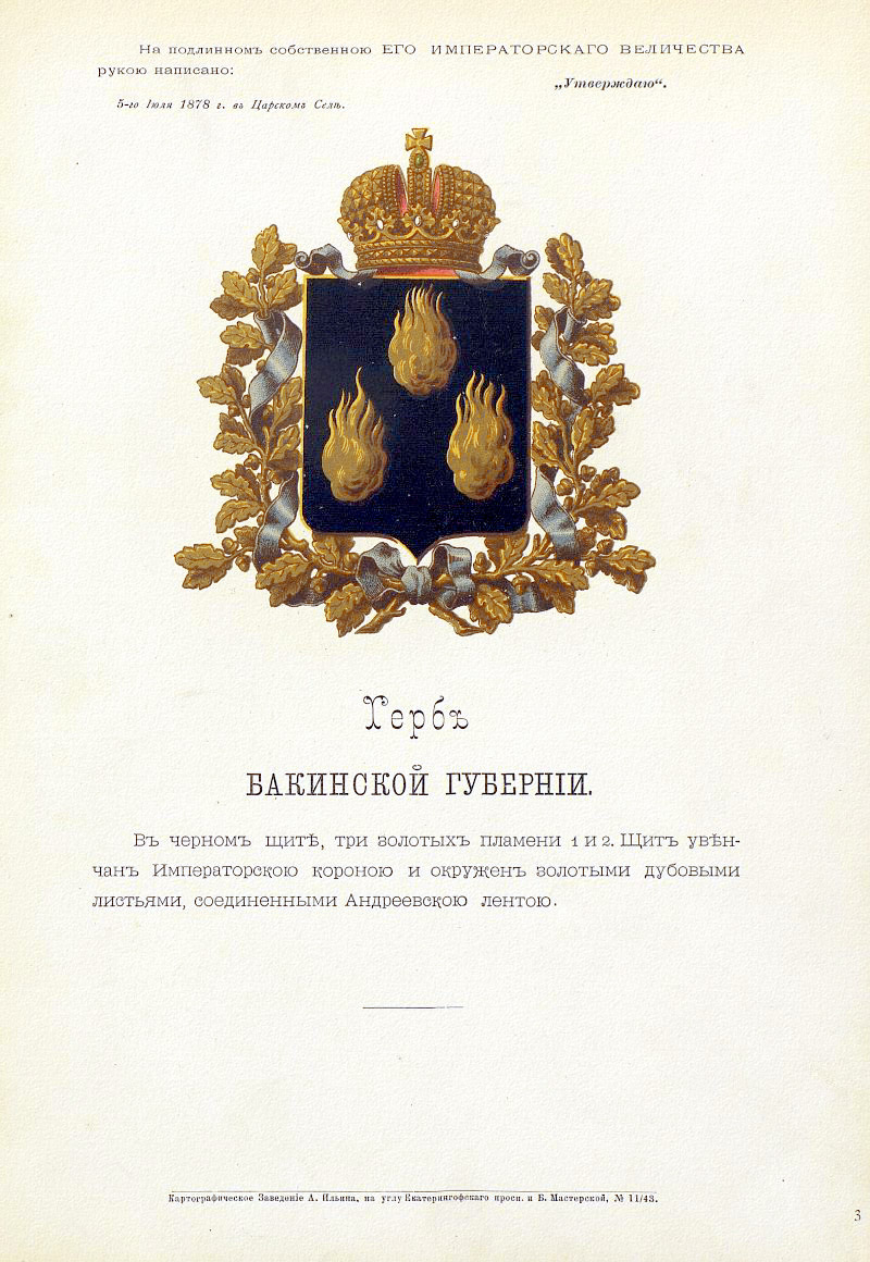 Official Russian Empire coat of arms Baku Governorate. Герб Российской Империи Бакинской губернии с официальным описанием в в Гербовнике Министерства внутренних дел Российской Империи 1880 года. Утверждён Императором Всероссийским Александром Вторым в 1878 году.